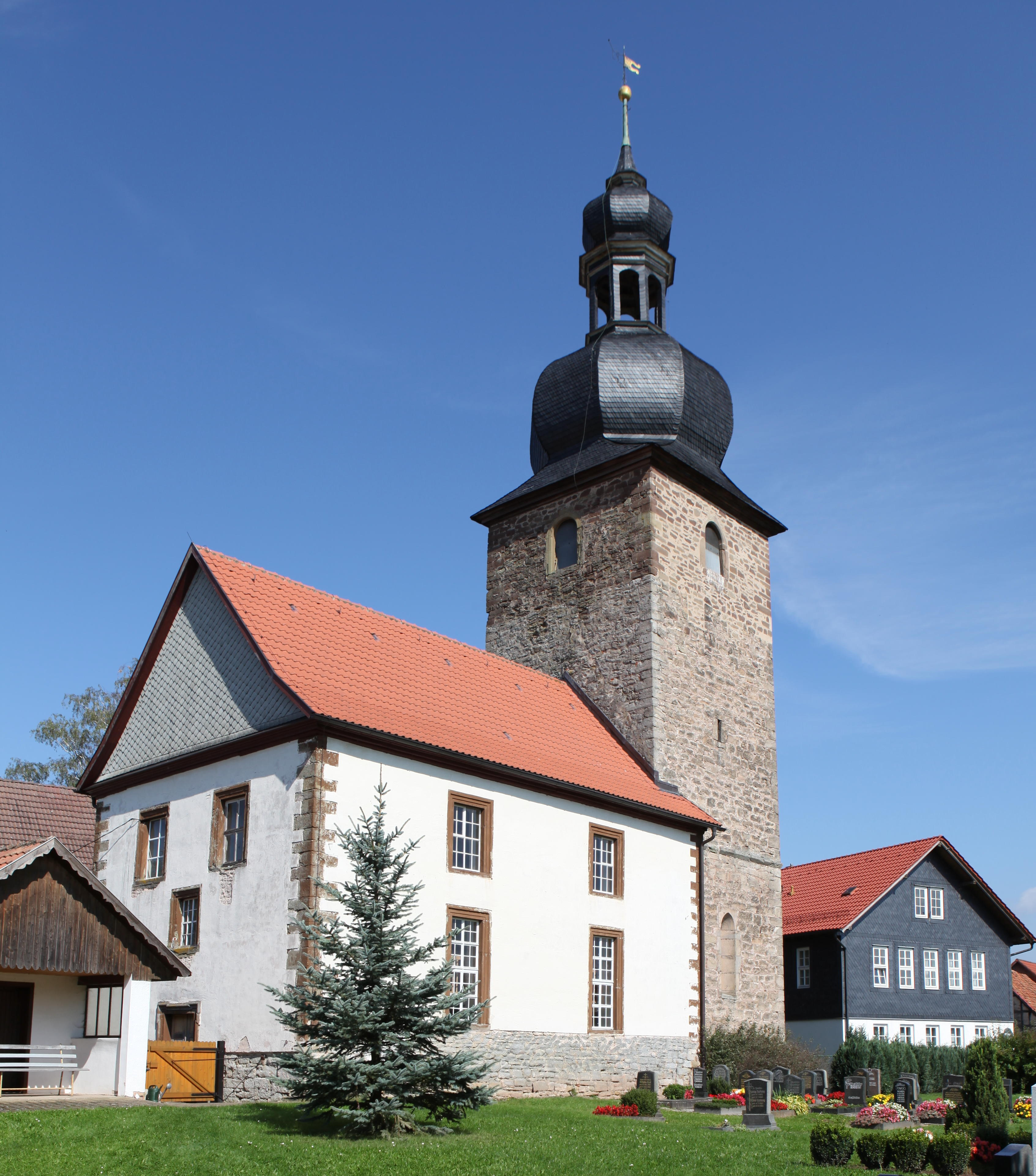 Evangelische Antoniuskirche in Eicha, Landkreis Hildburghausen